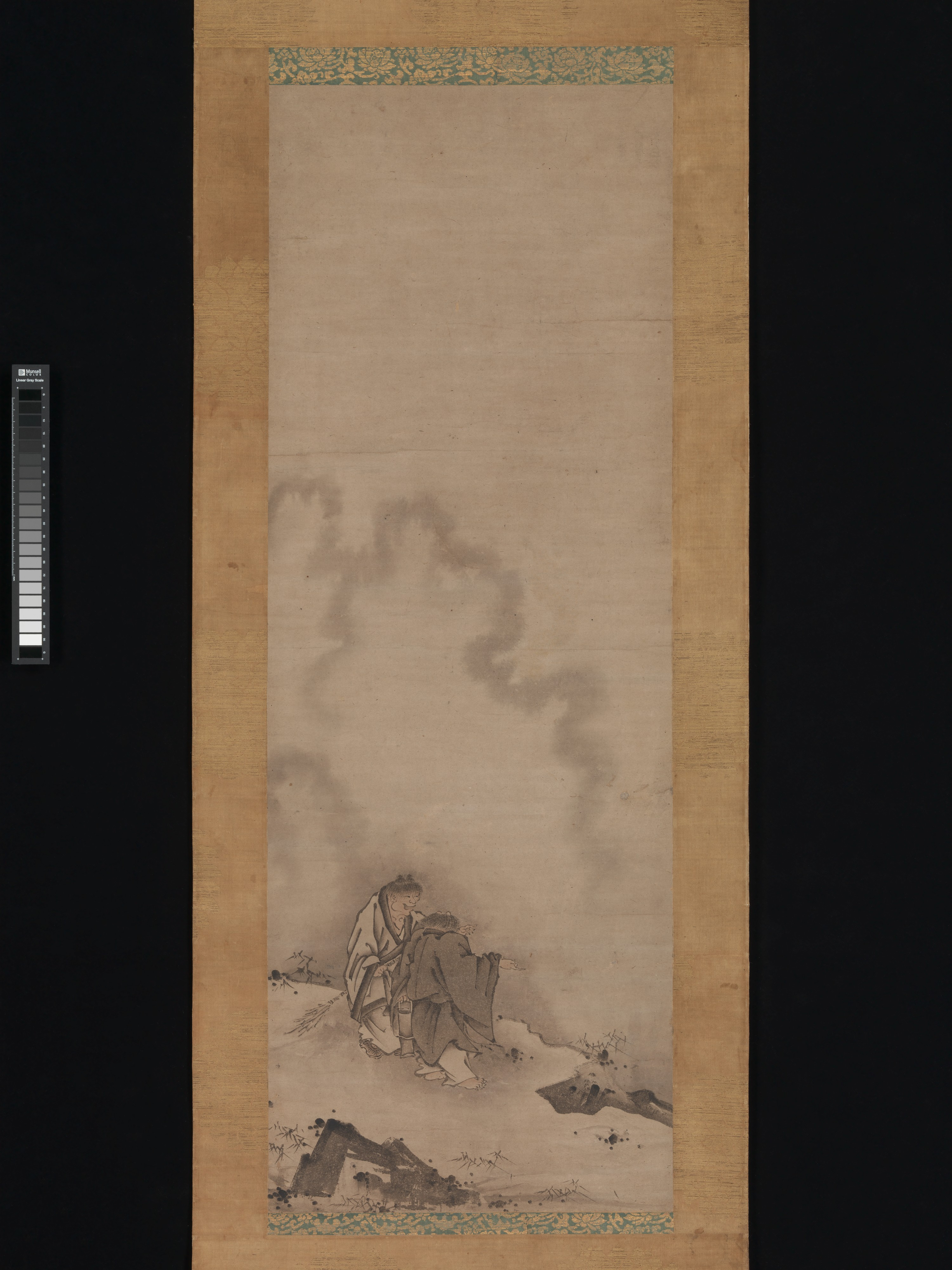 Japan; Hanging scrolls; Paintings